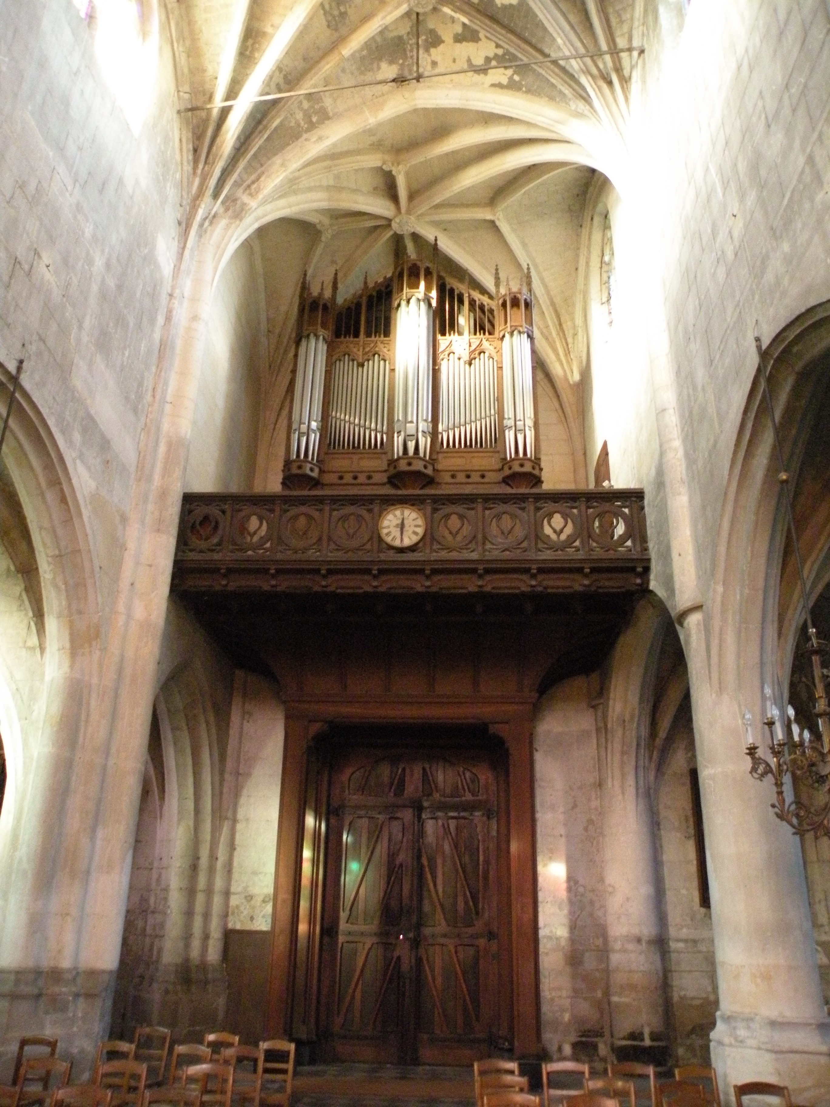 Grand-orgue.